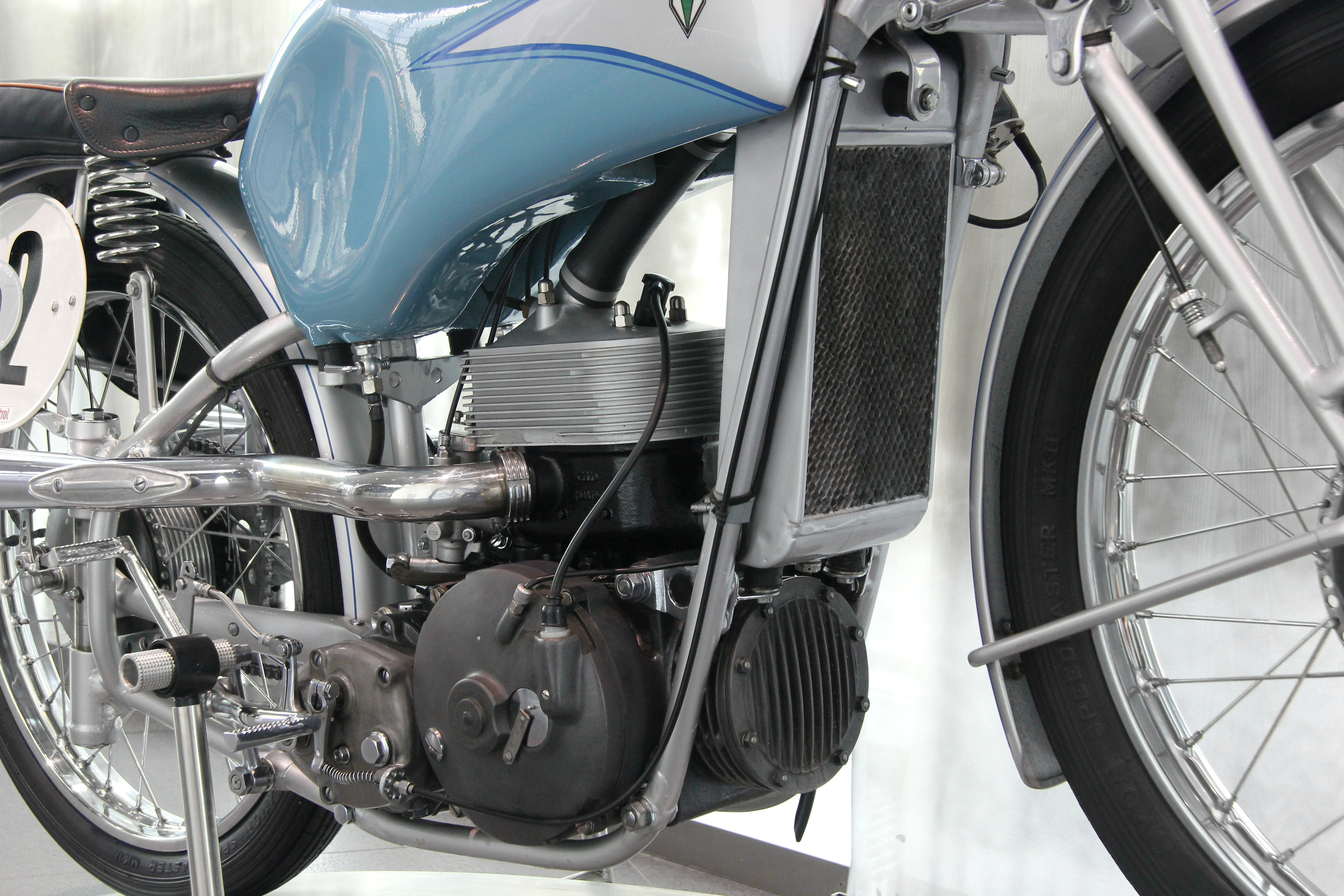 DKW SS 250 im museum mobile in Ingolstadt. Zweitakt-Doppelkolbenmotor mit Ladepumpe